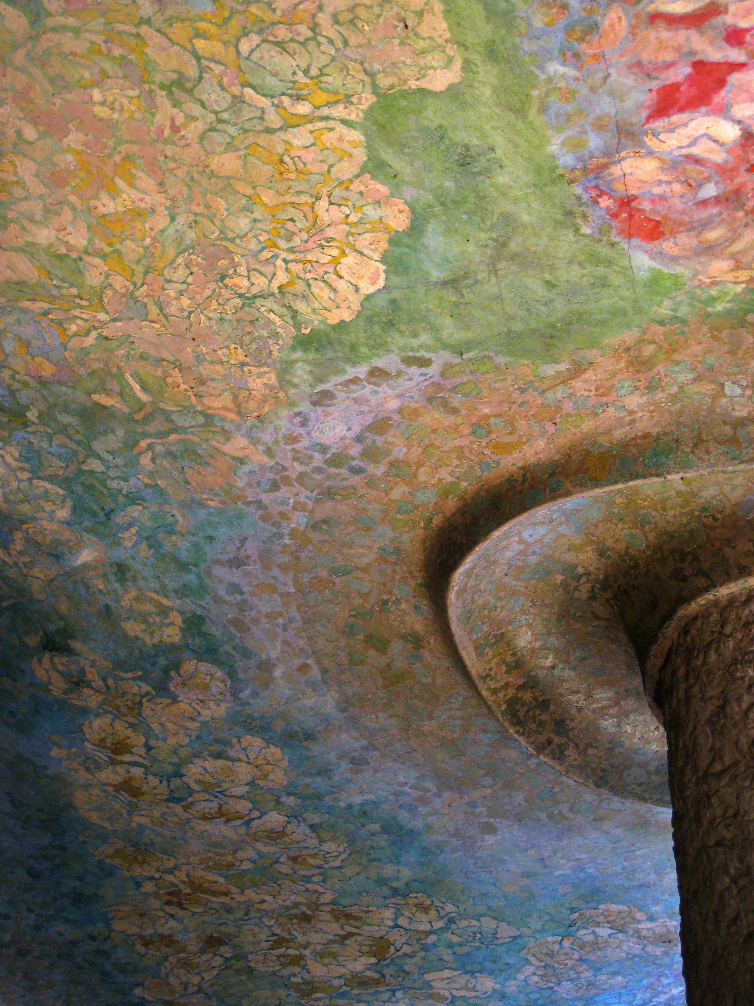 Sostre escala al pis principal de la Casa Mila, pintada per Iu Pascual (1910)